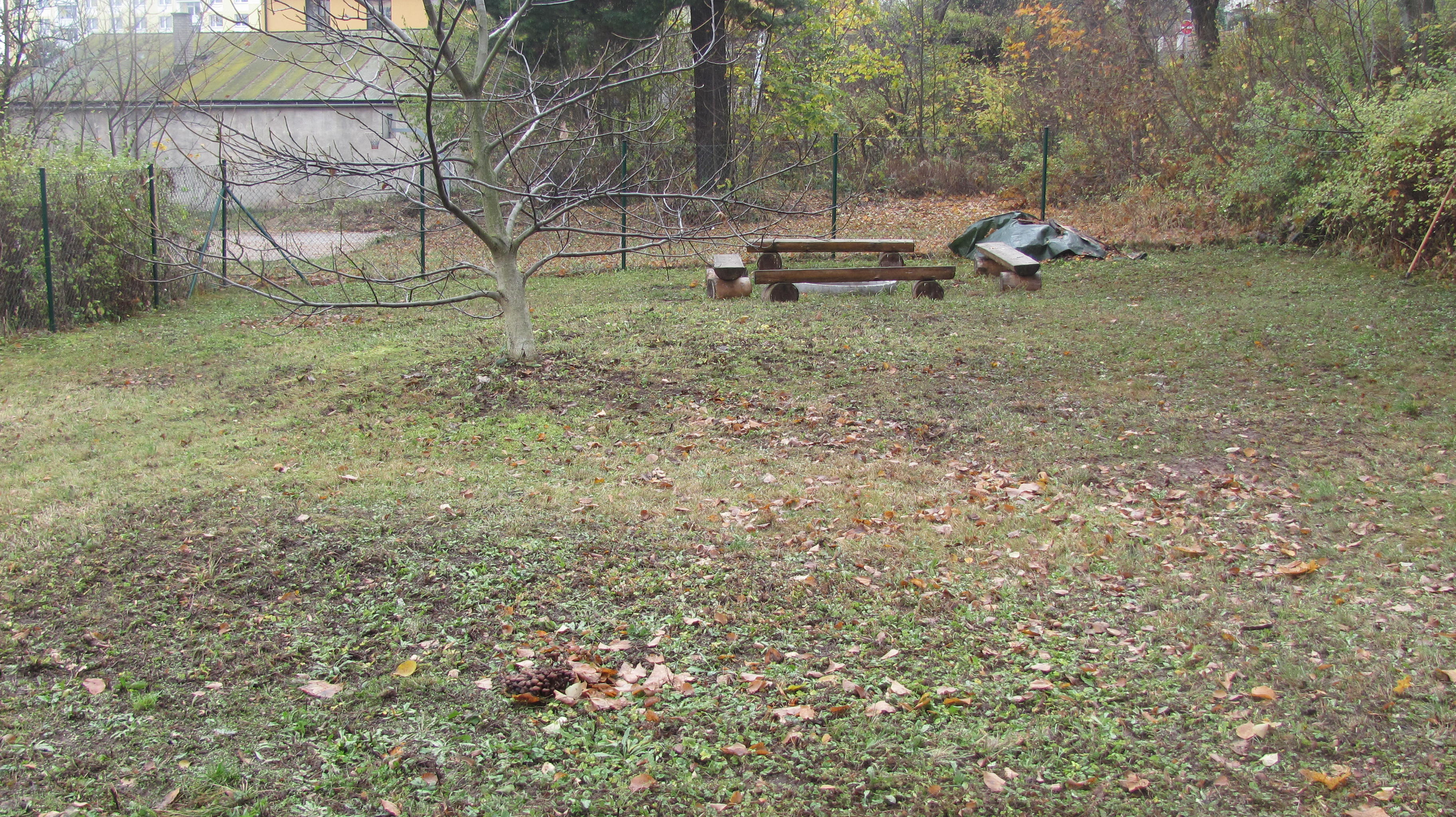 Nácviková zahrada